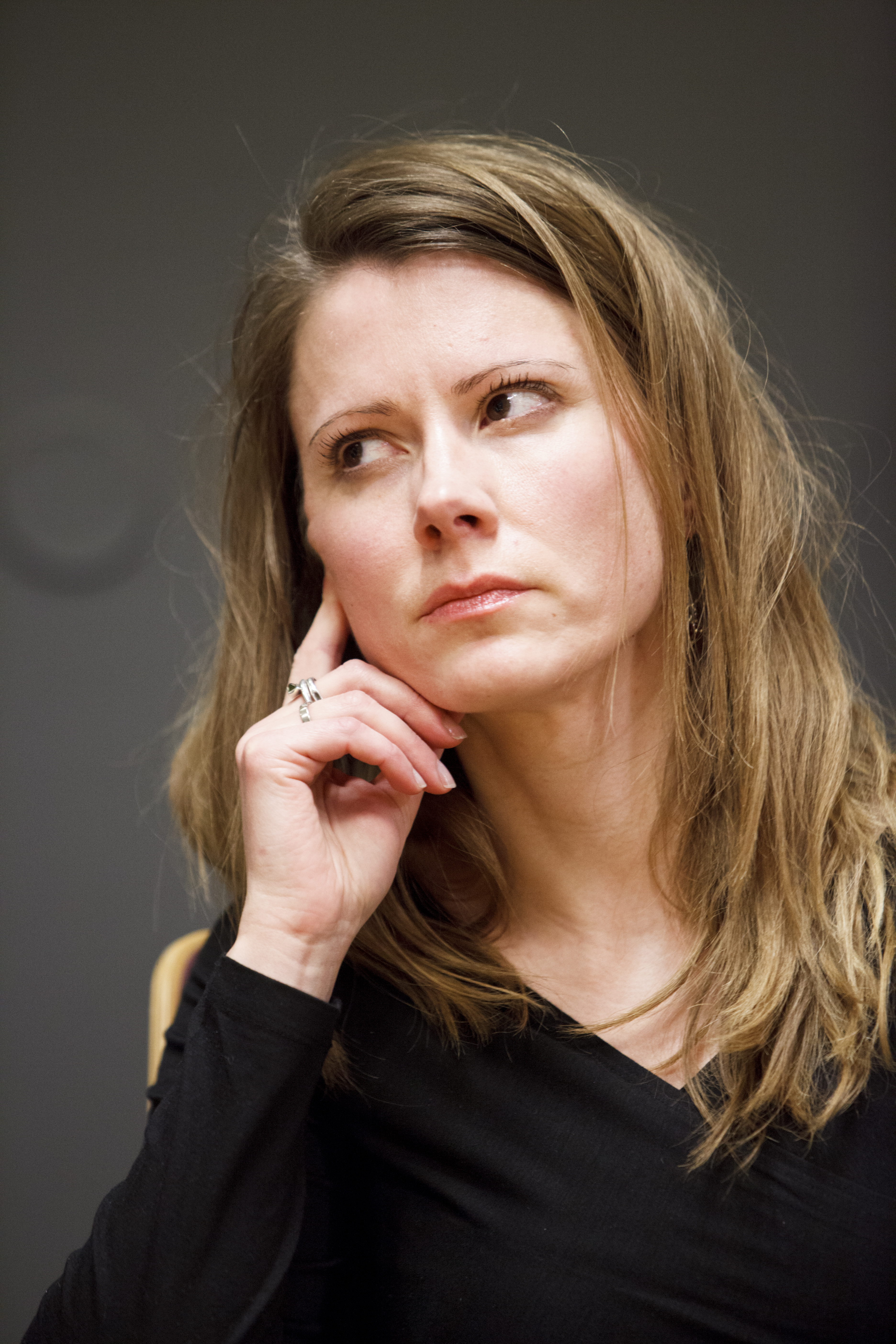 Gerður Kristný fra Island, nomineret til Nordisk Råds litteraturpris 2012 til litteraturarrangement hos Kulturkontakt Nord i Finland.